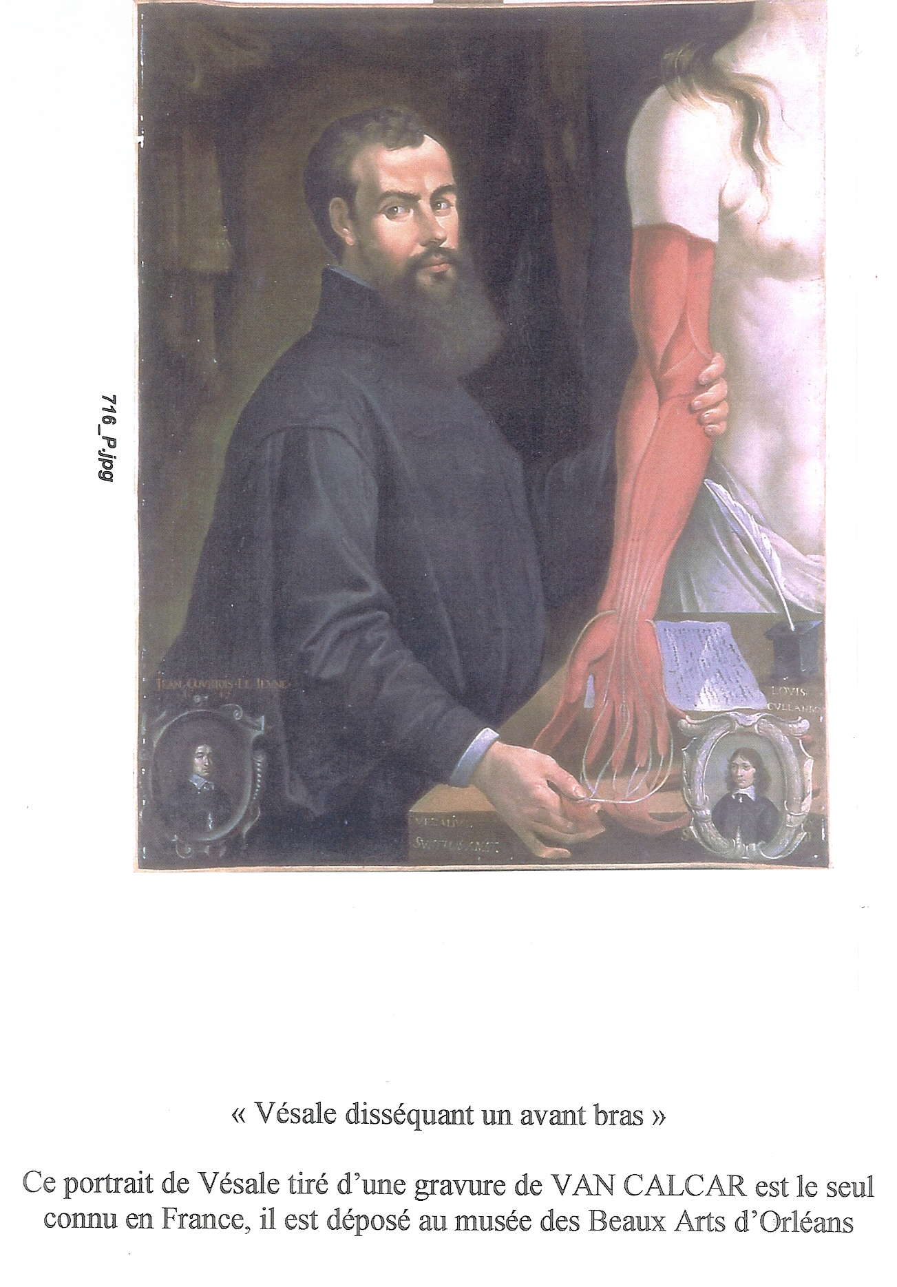 Vésale disséquant un avant-bras